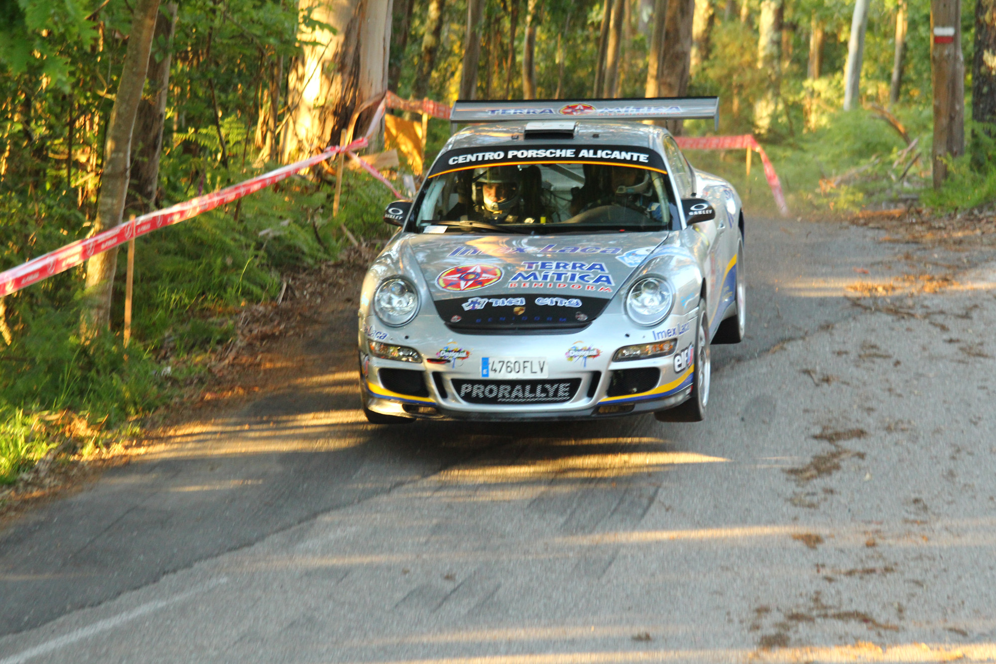 Rally Rias Baixas 2013 (Miguel Fuster)